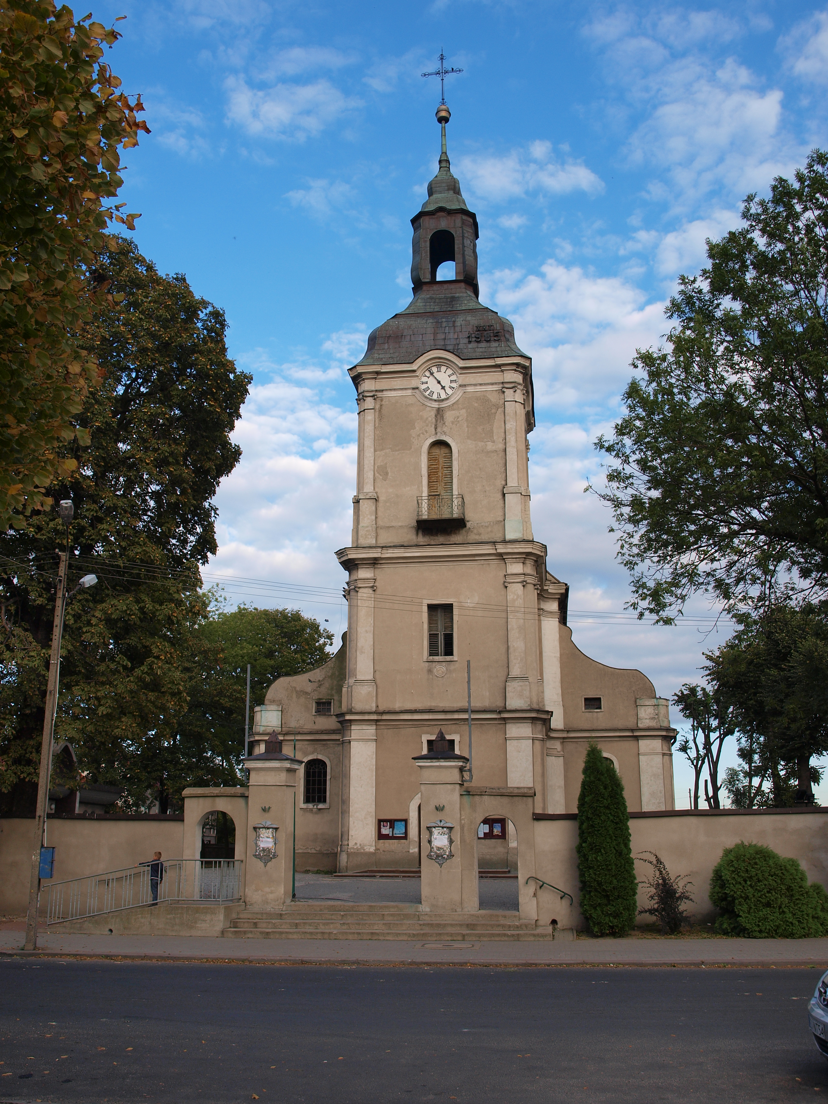 Błaszki - kościół parafialny pw. św. Anny, mur., 1770